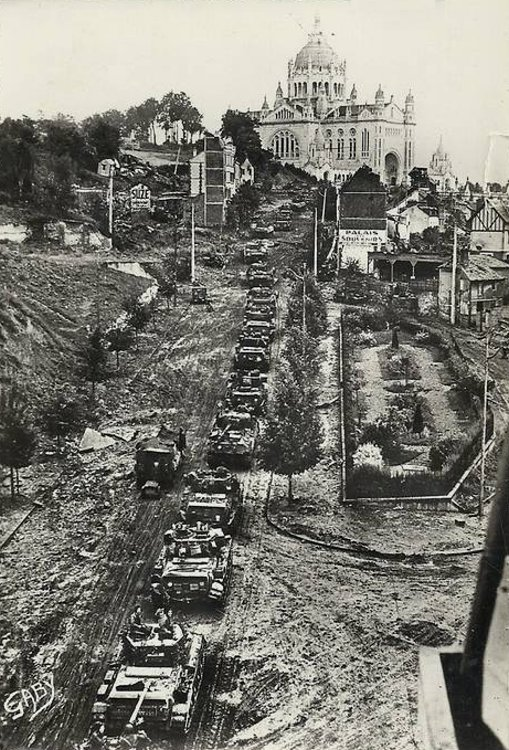 Lisieux, département du Calvados, sur une carte postale avec en illustration photo de l'entrée des troupes alliées dans Lisieux en août 1944. Vue plongeante sur l'avenue Sainte-Thérèse. Vue du Nord-Ouest vers le Sud-Est. La basilique Sainte-Thérèse est en arrière-plan.